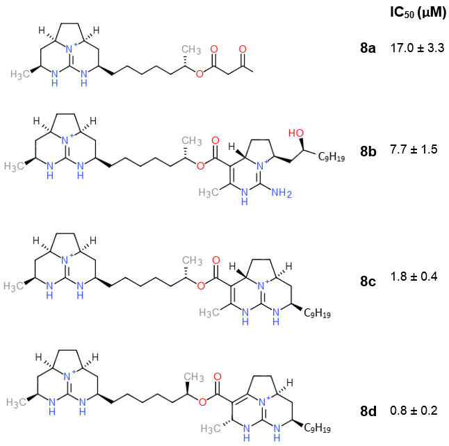 Exemples d'anàlegs obtinguts en la recerca del grup Overman. El compost 8d és l'anàleg amb una estructura més similar a la Batzelladina F.